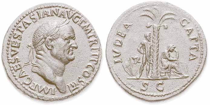 מטבע יהודה השבויה